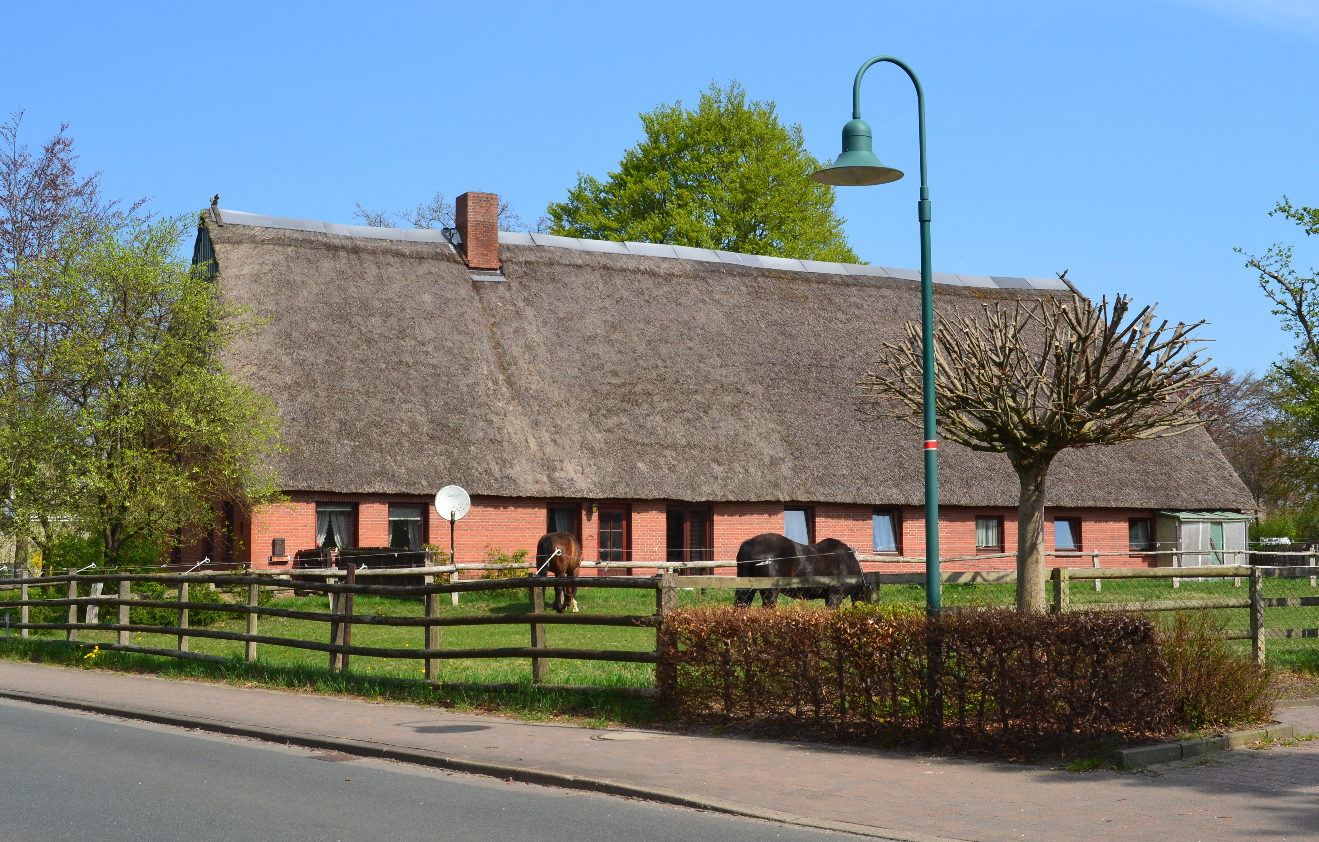 Das Wohn- und Wirtschaftsgebäude Mühlenstraße 13 in Bokel (Kreis Pinneberg) (Kulturdenkmal)